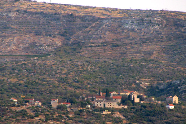 Selca kod Starog Grada iz trajekta.